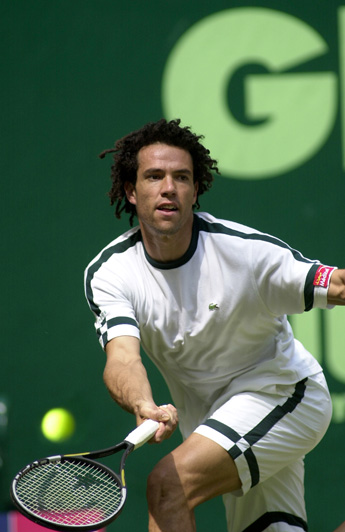 younès el aynaoui